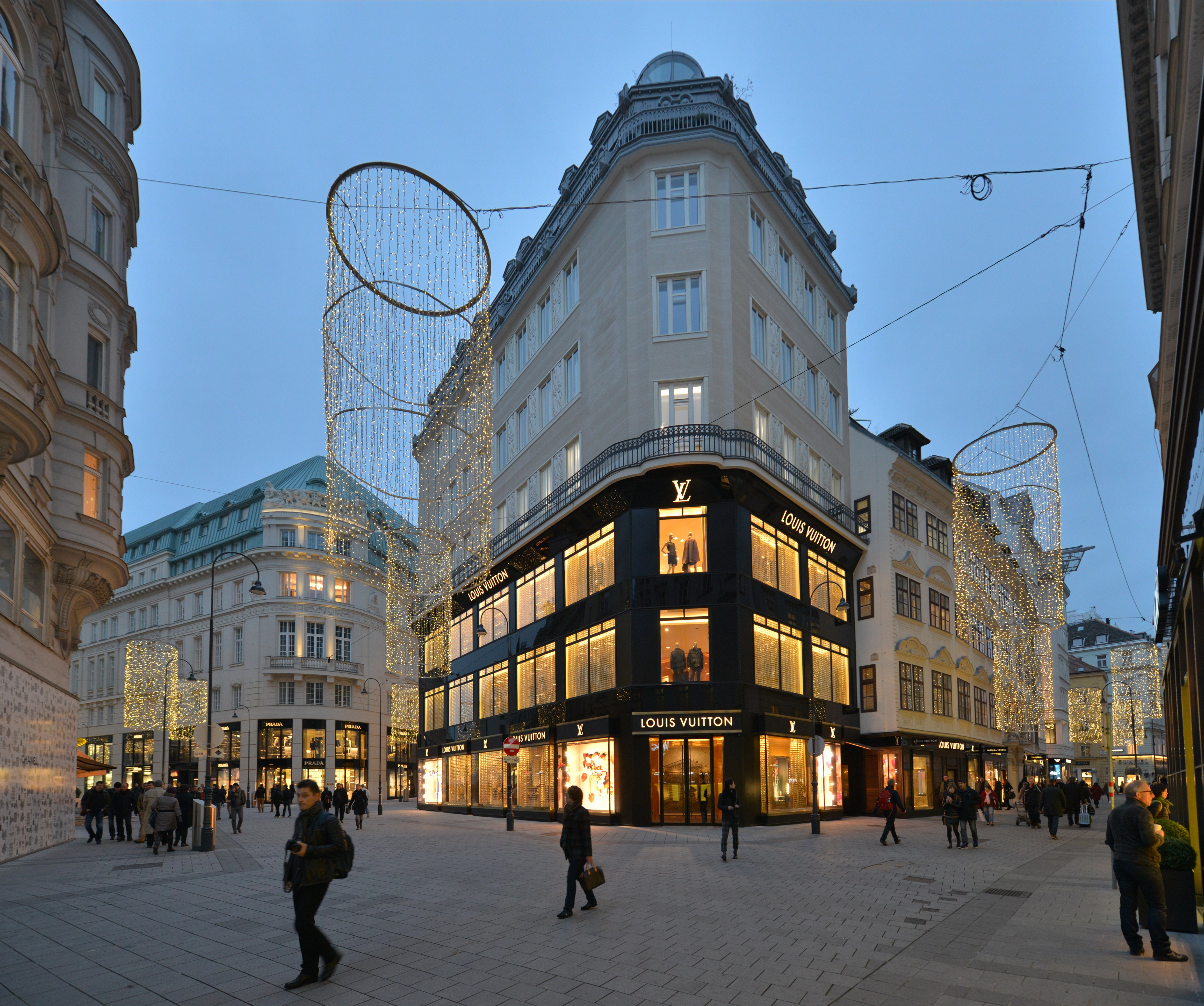 Wohn- und Geschäftshaus Louis Vuitton in Wien, Österreich